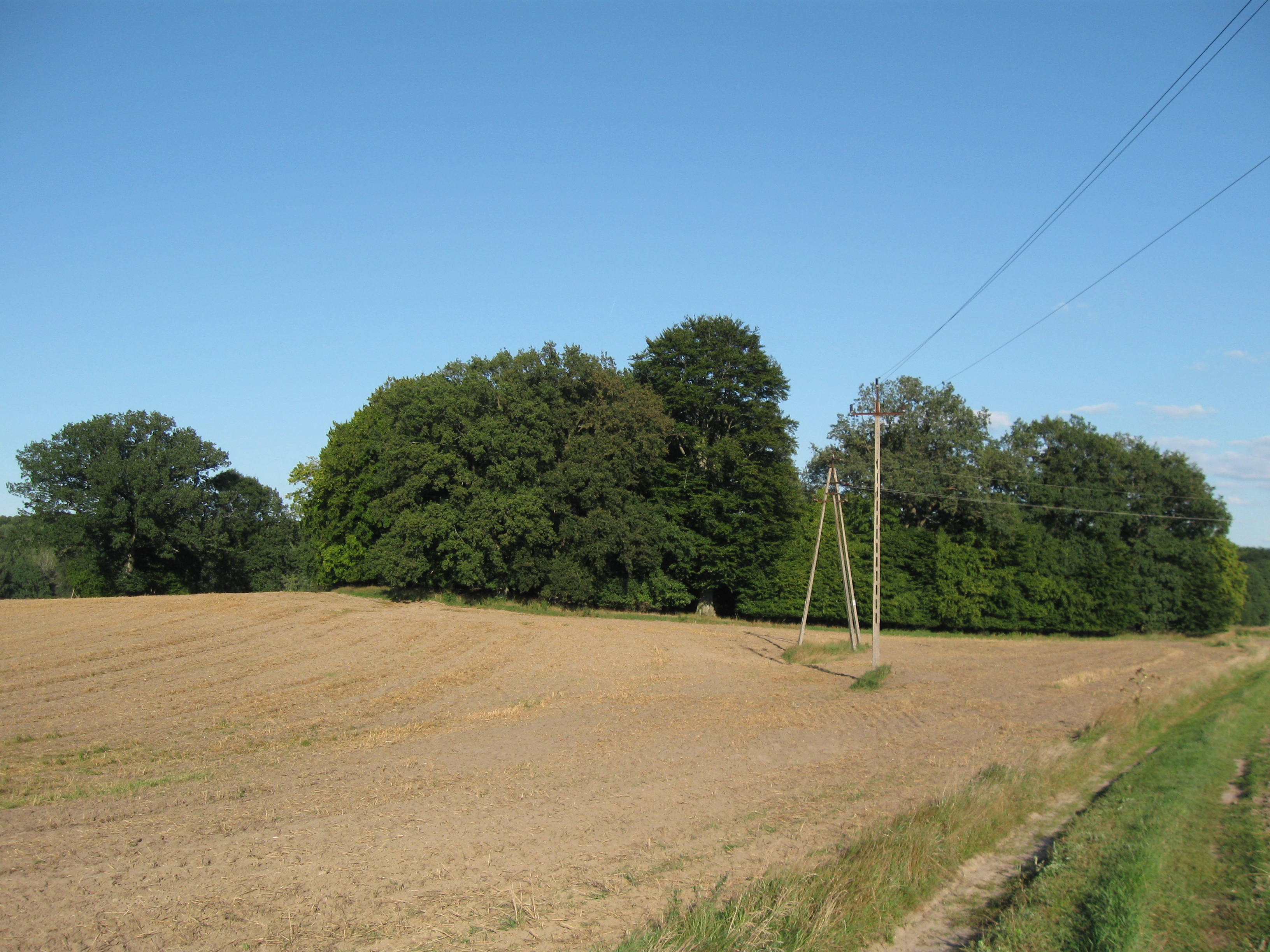 Małobór